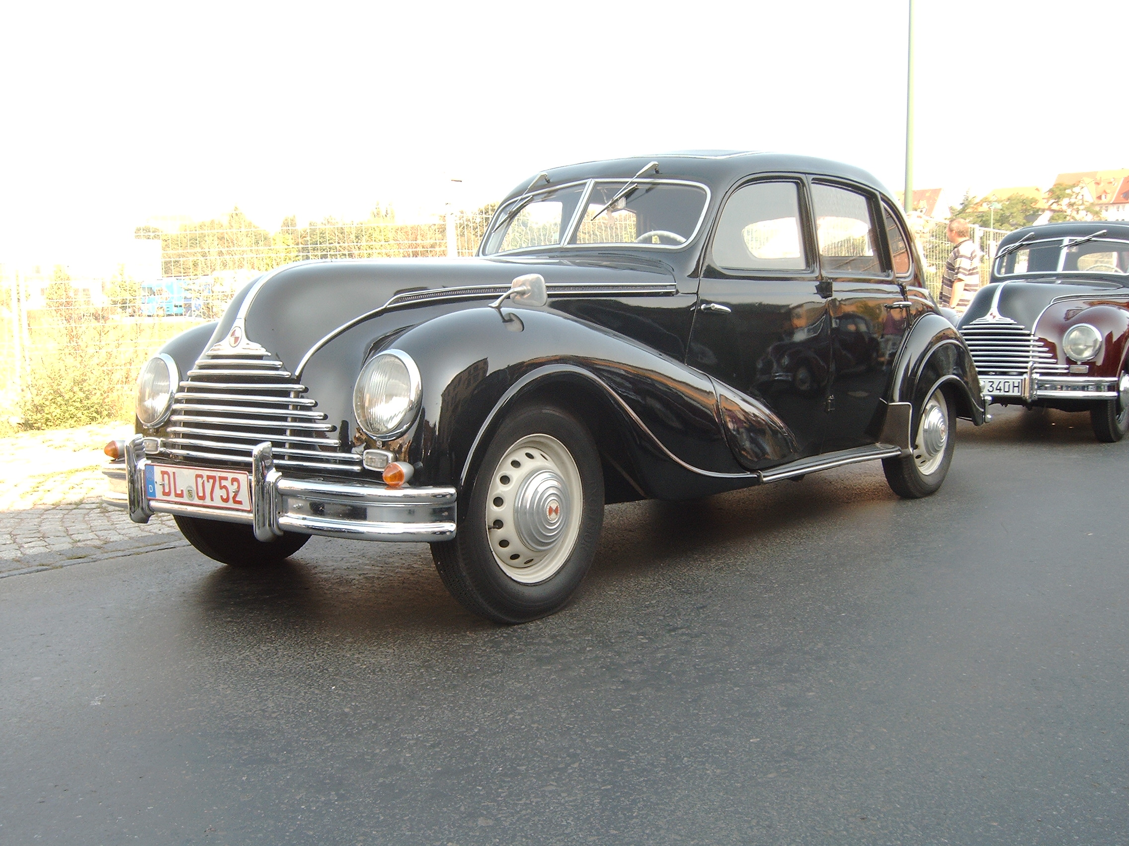 EMW340-2, EMW 340 Treffen, Eisenach, 04.09.2004